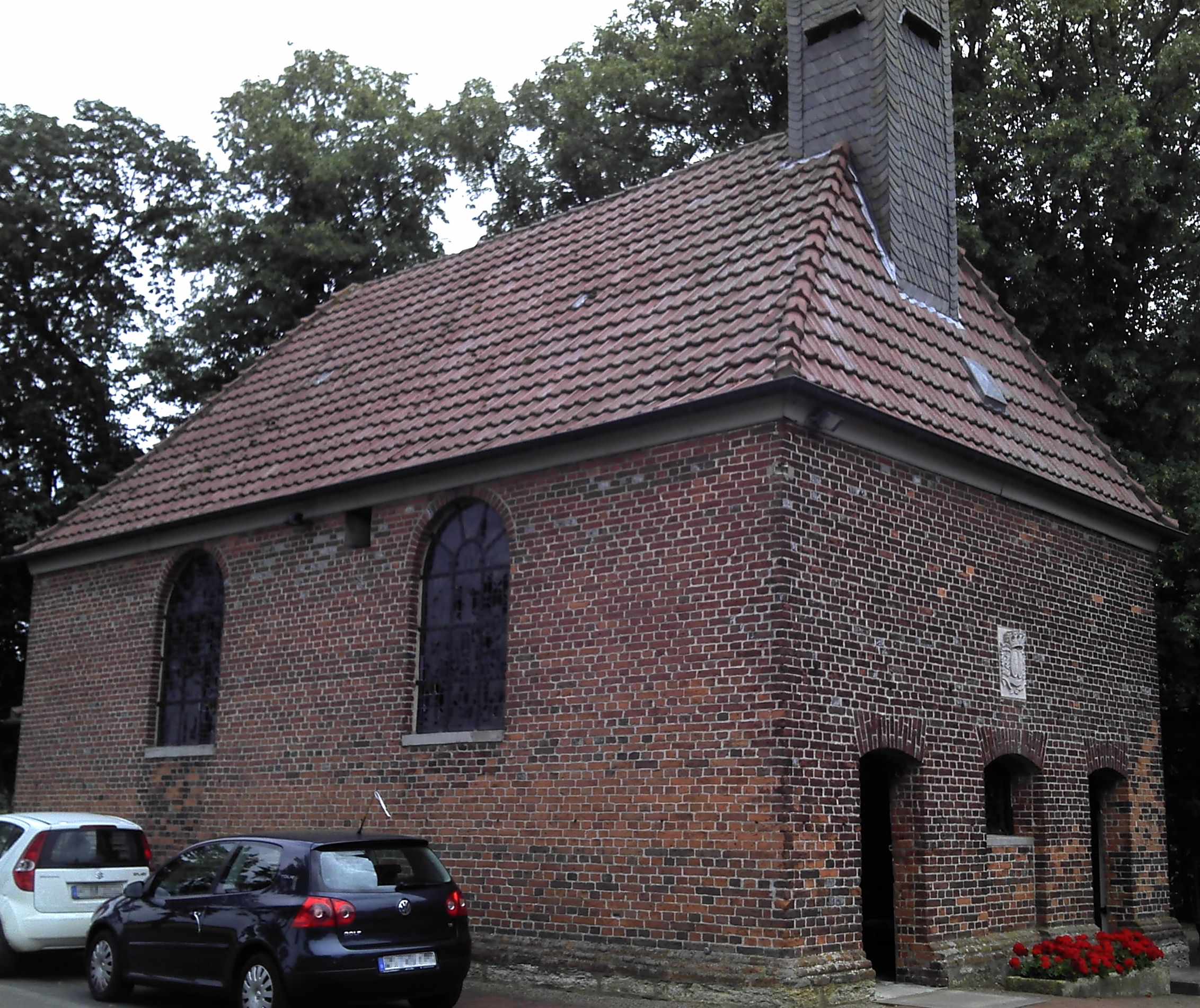 Wallfahrtskapelle zur Schmerzhaften Mutter von außen. Bauernschaft Buddenbaum, Ortsteil Hoetmar, Stadt Warendorf.